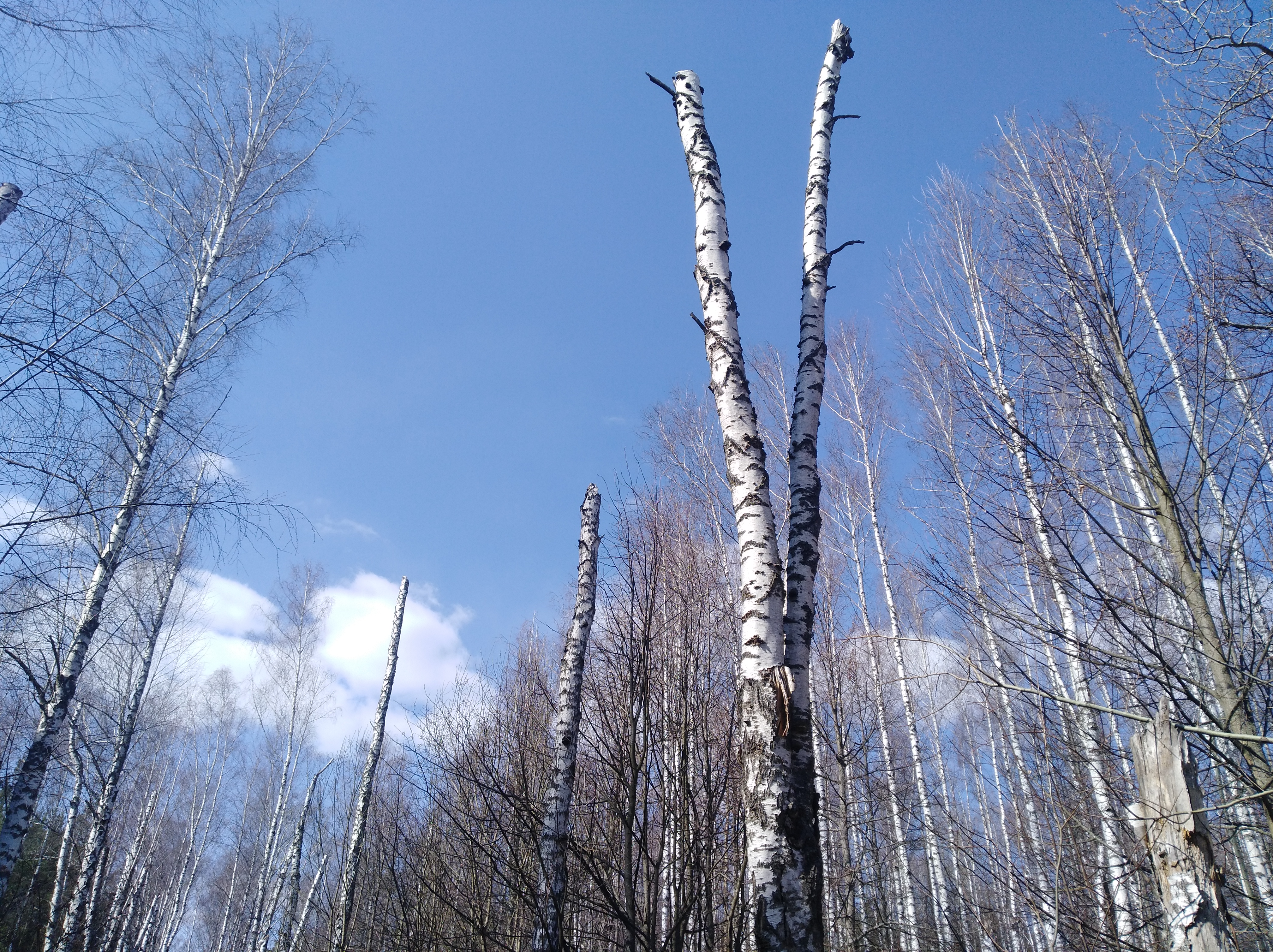 Засохшие берёзы